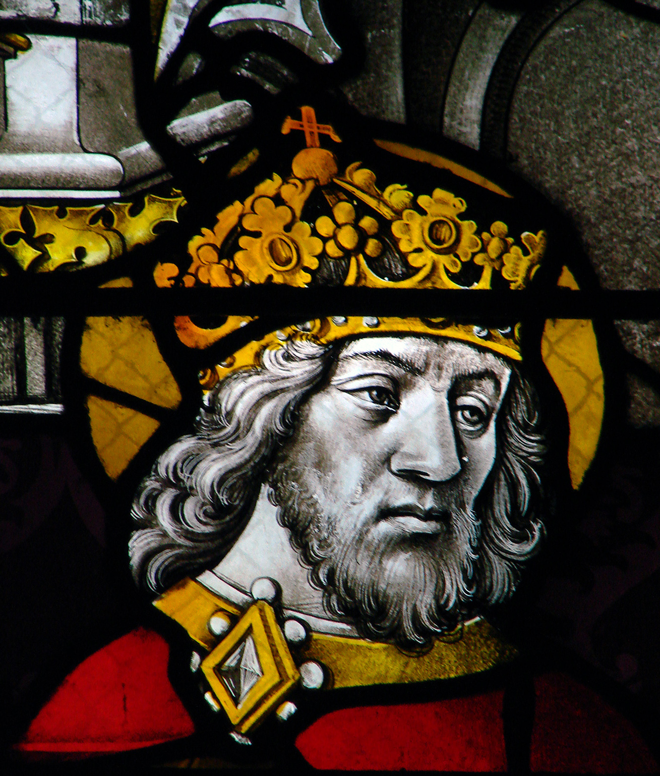 Basilique-cathédrale Notre-Dame de l'Annonciation de Moulins; vitrail de Sainte Catherine, dit vitrail des ducs, fin du 15ème siècle. Détail:Charlemagne.